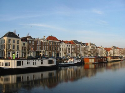 Houses and houseboats at the Londensekaai in Middelburg (not Rouaansekaai)